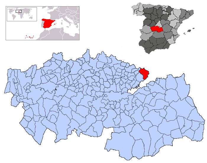 Seseña en la provincia de Toledo